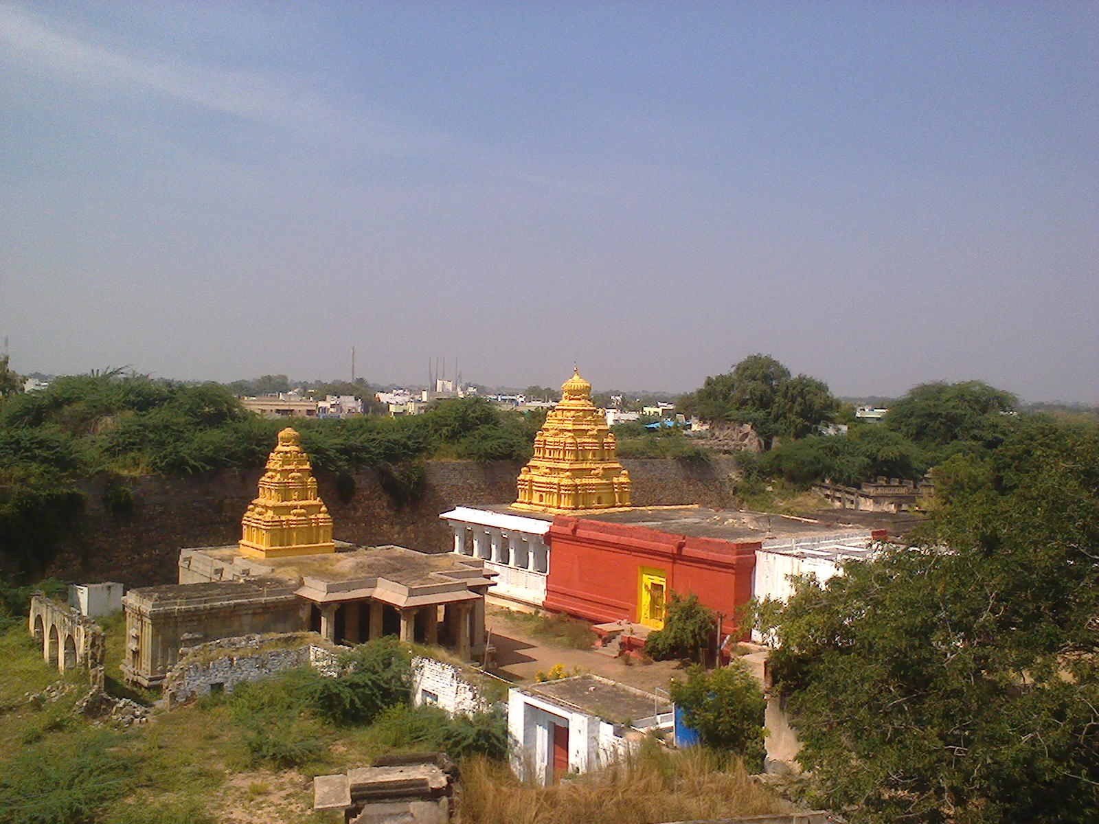 కోటలో చెన్నకేశవాలయం